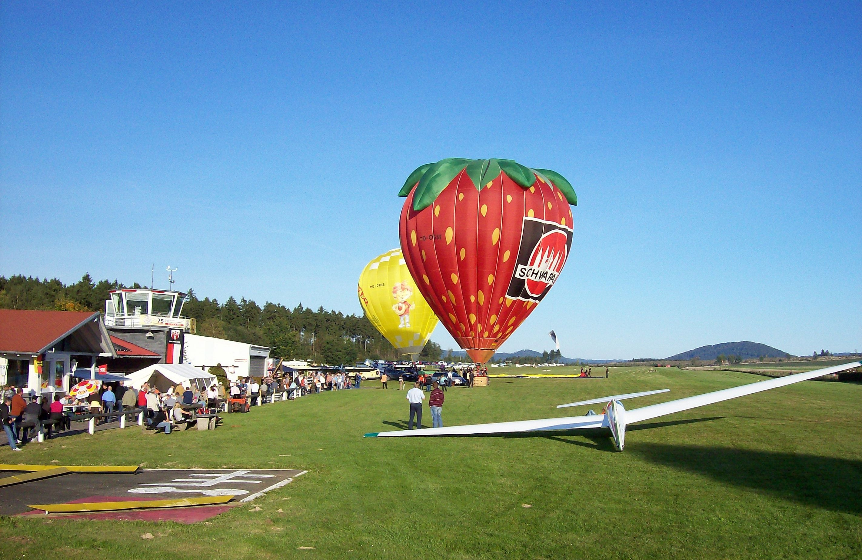 Schmallenberg-Rennefeld (Germany), 75 Jahre Luftsport in Schmallenberg